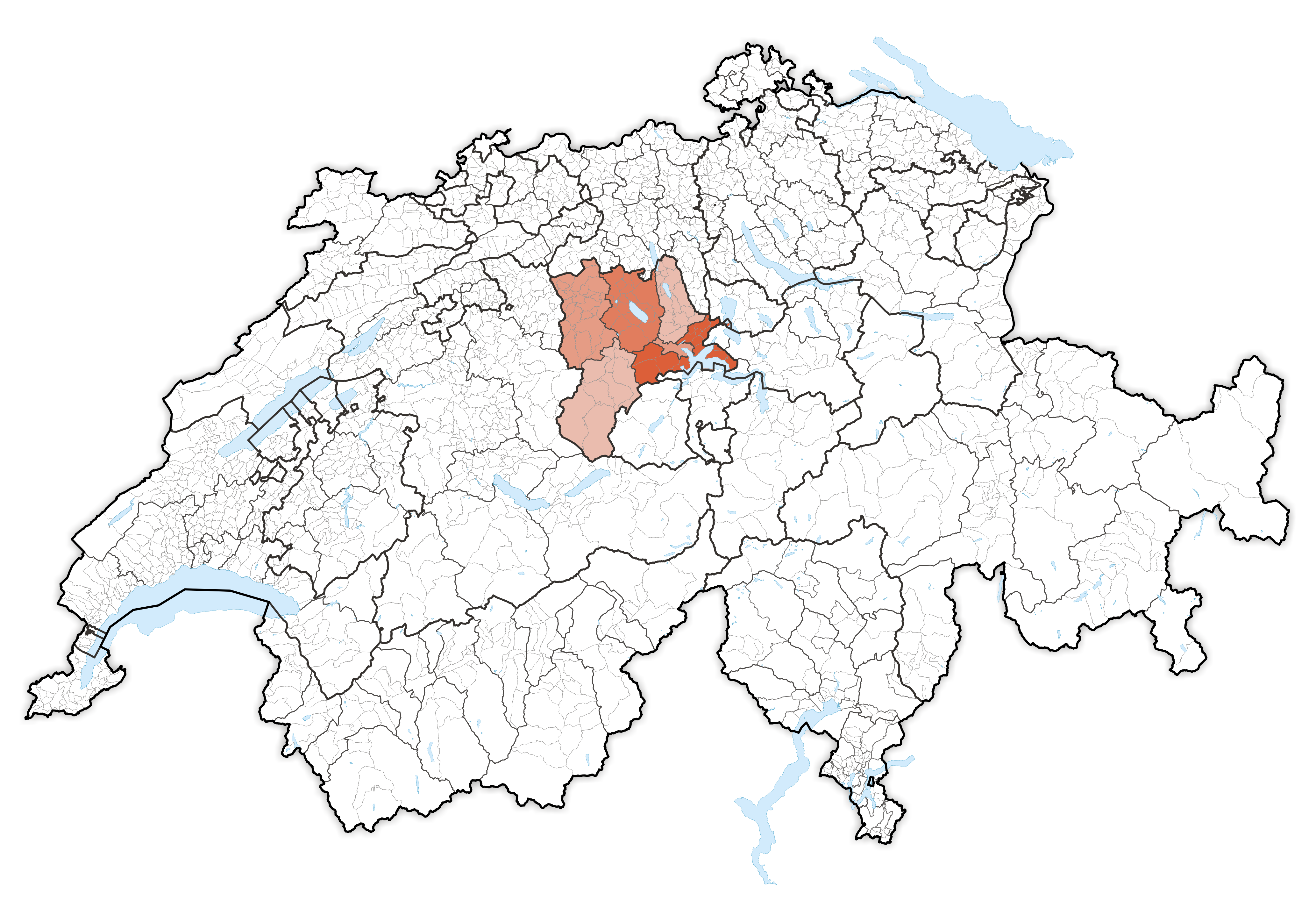 Canton Luzern